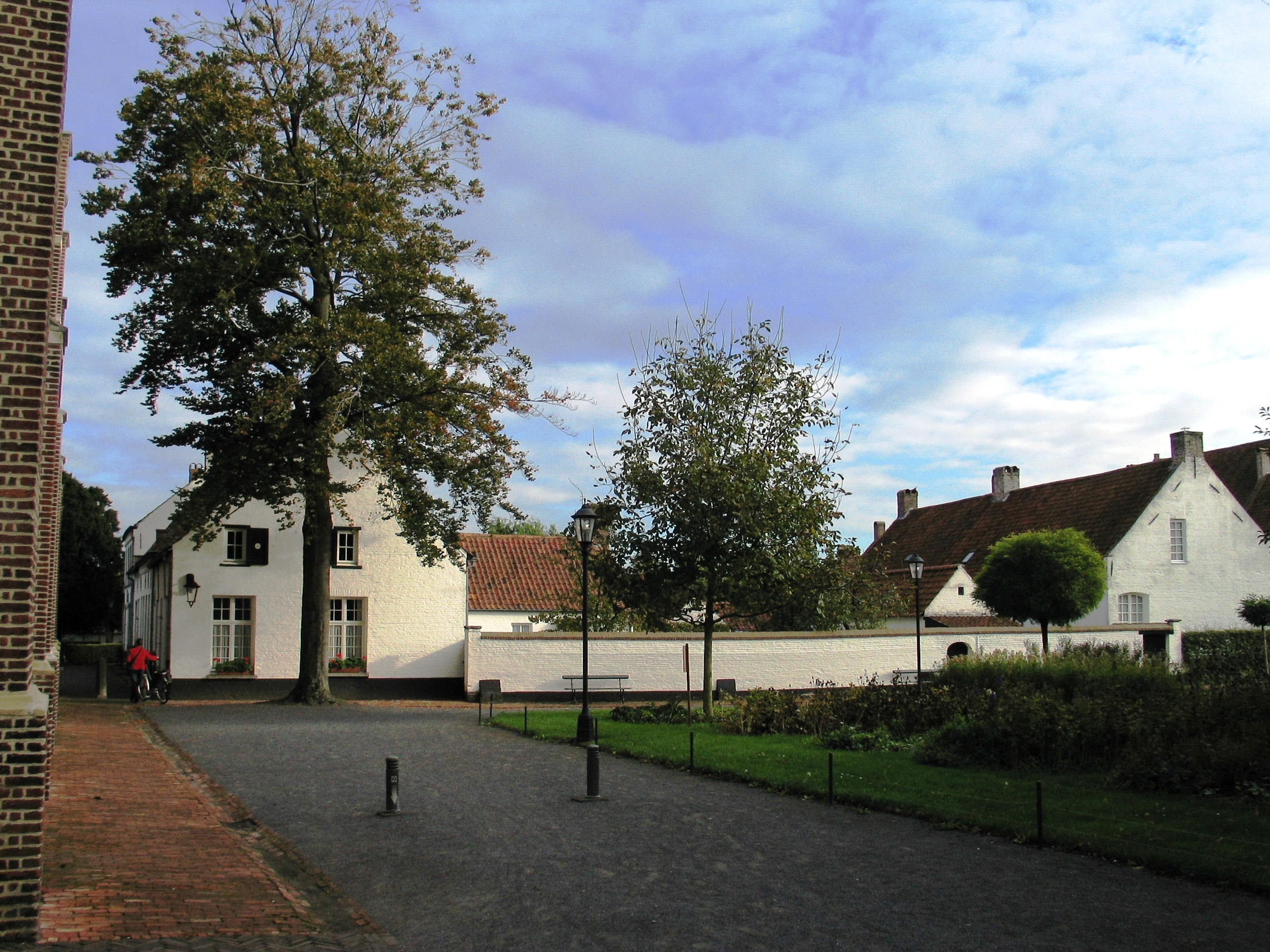 Begijnhof Hoogstraten. Eigen werk.